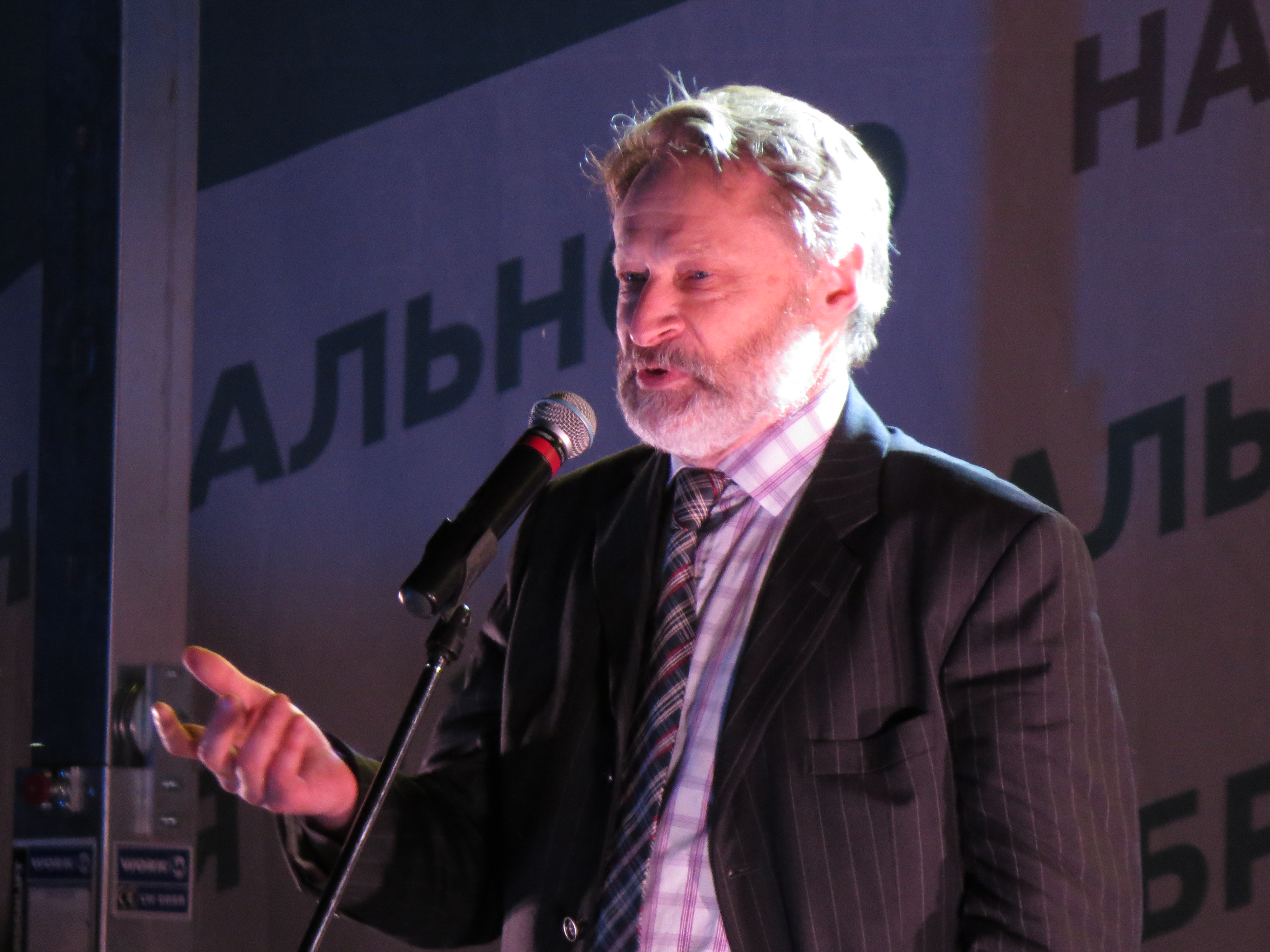 Митинг Алексея Навального на Болотной площади после объявления результатов выборов мэра Москвы, 9 сентября 2013 года